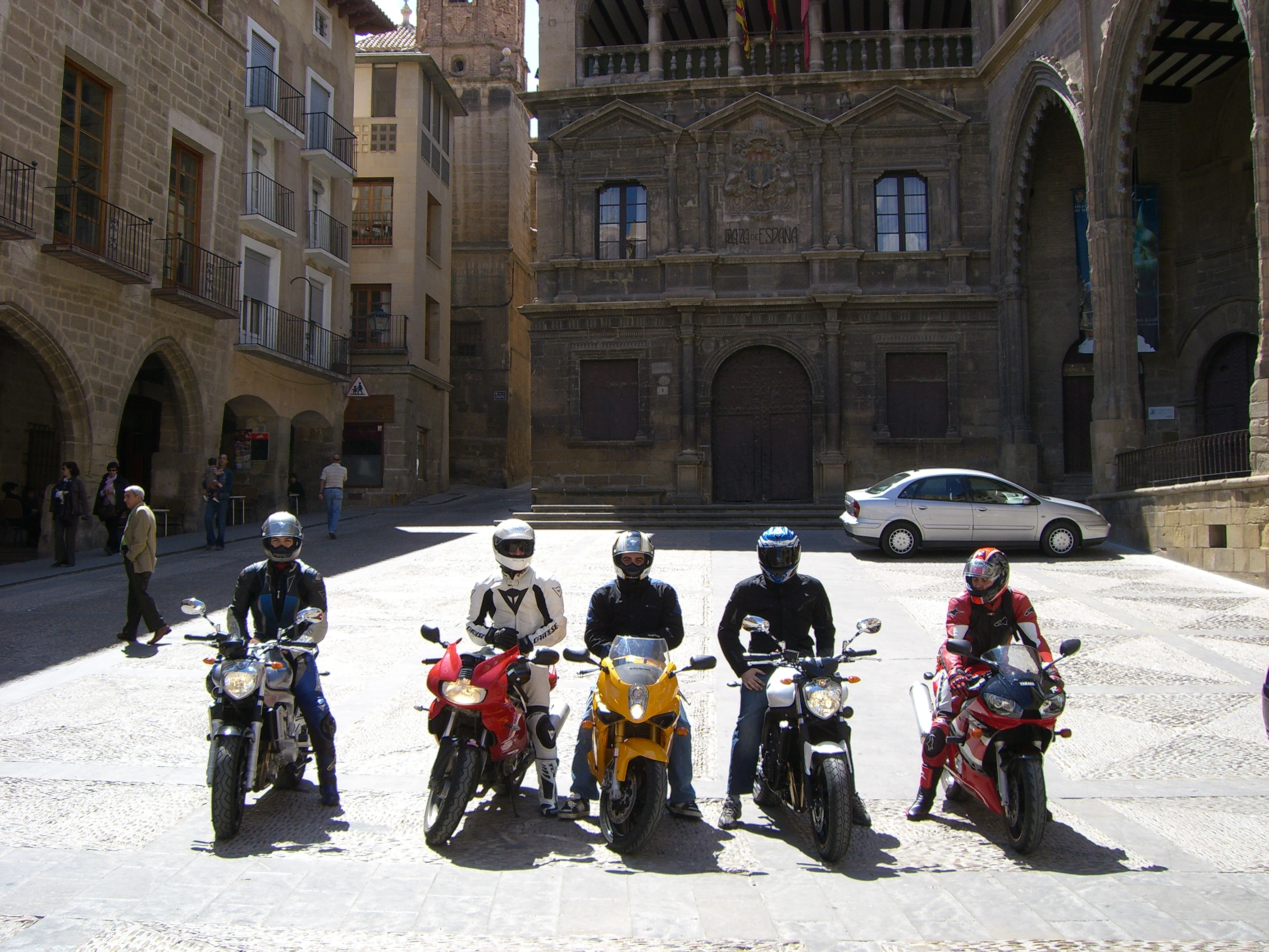 Salida Alcañiz 13/04/2008